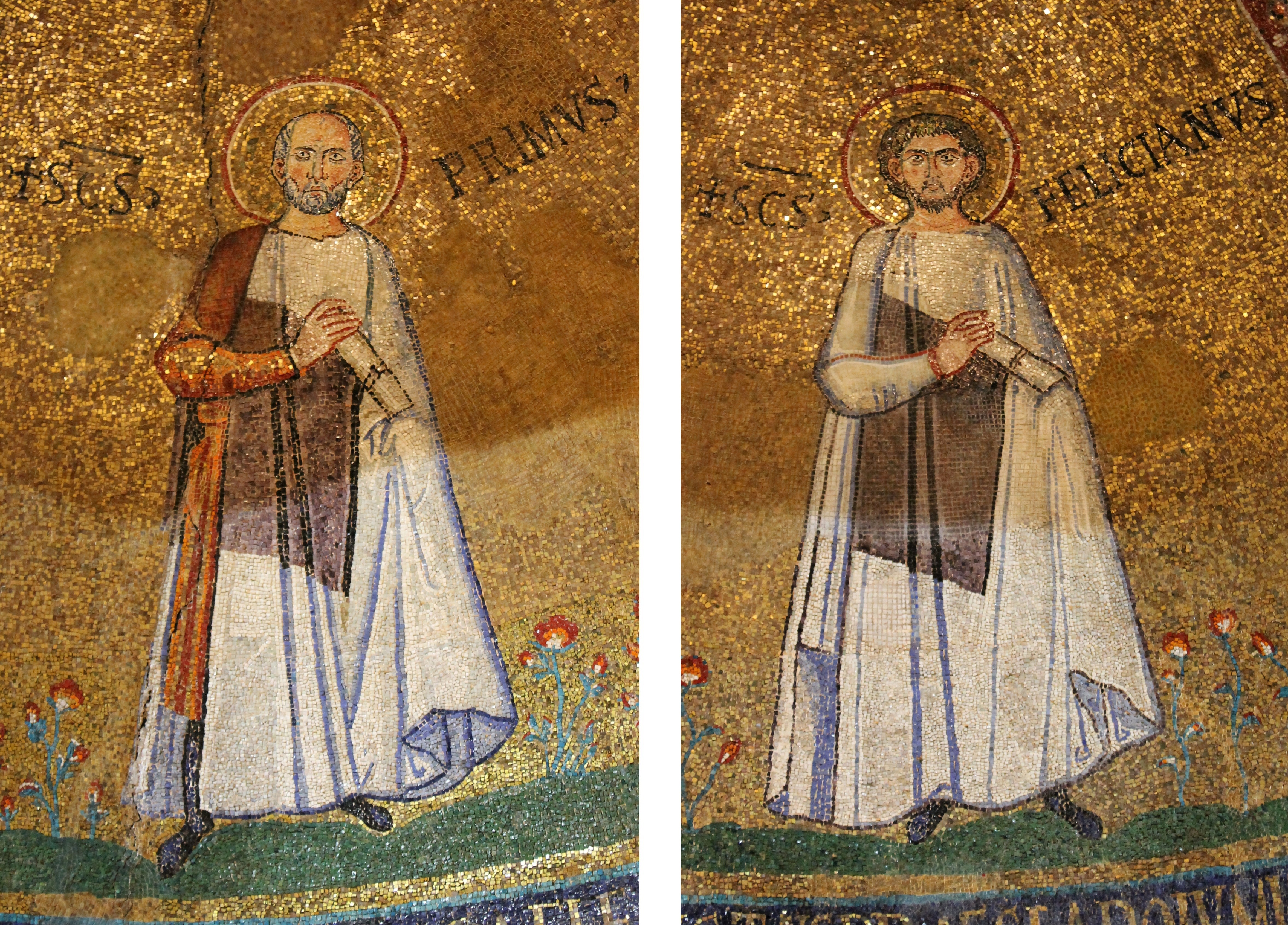 Imagines Sanctorum Martyrum Primi et Feliciani in ecclesia Sancti Stephani in monte Caelio